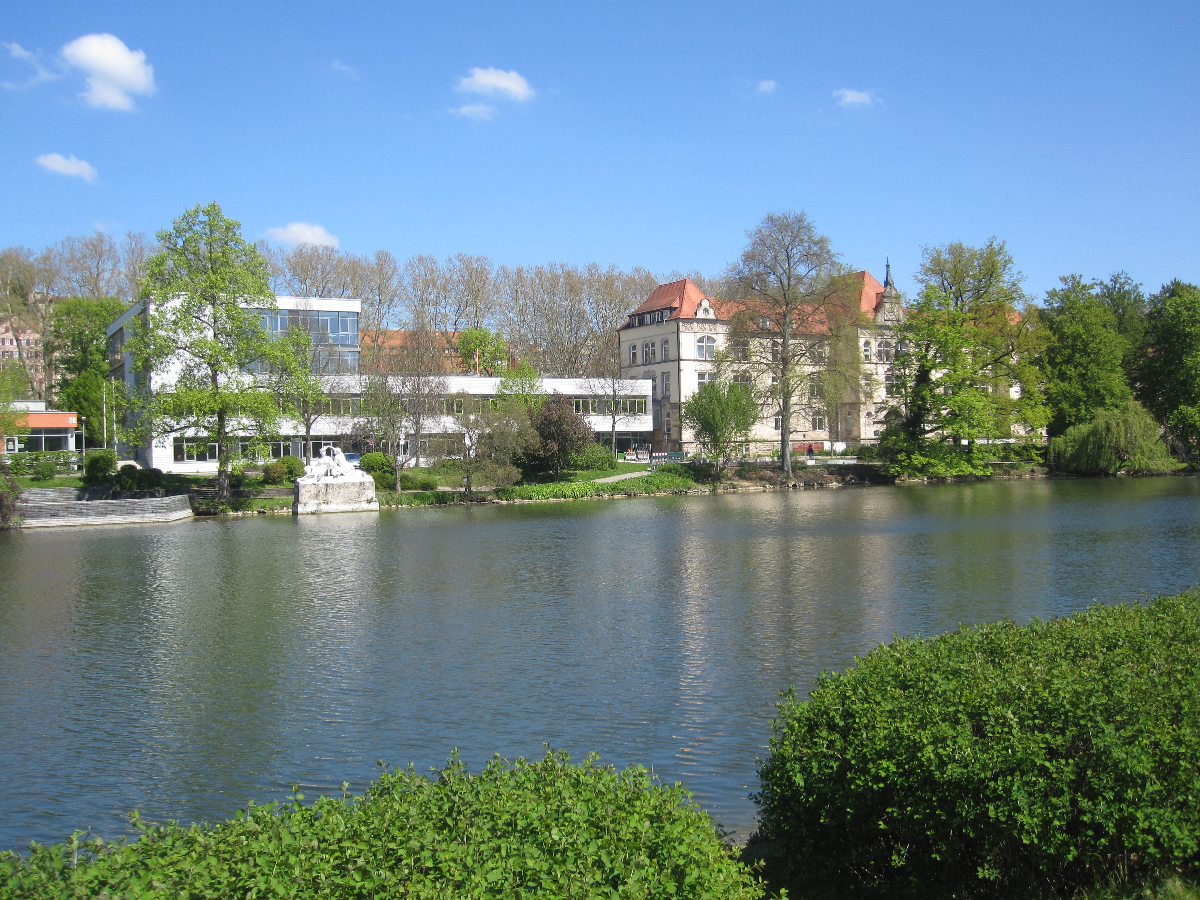 Uhland-Gymnasium Tübingen. Ansicht mit altem und neuem Gebäude und dem Anlagensee.